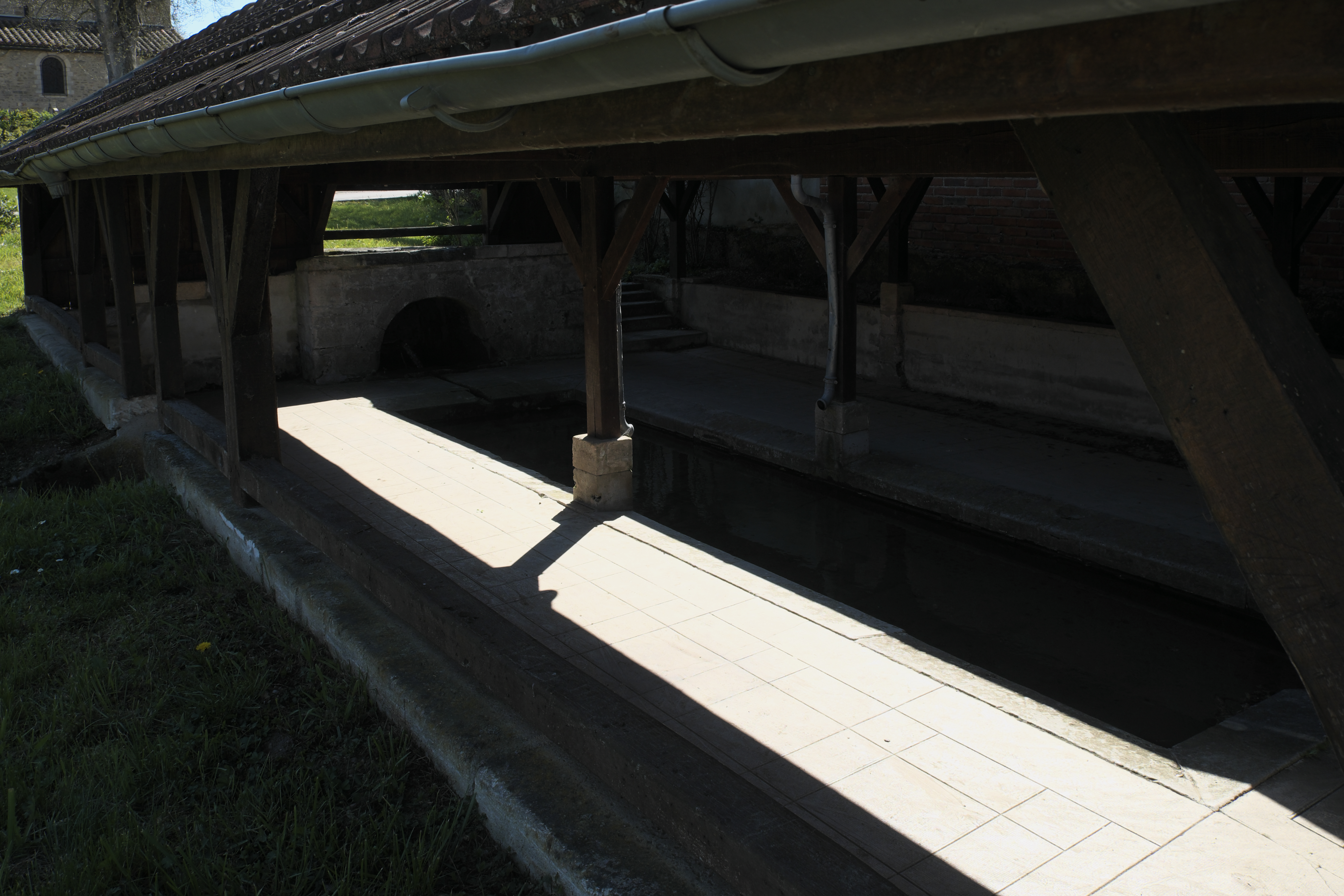 Waschhaus (lavoir) in Blesme im Département Marne (Region Grand Est/Frankreich)